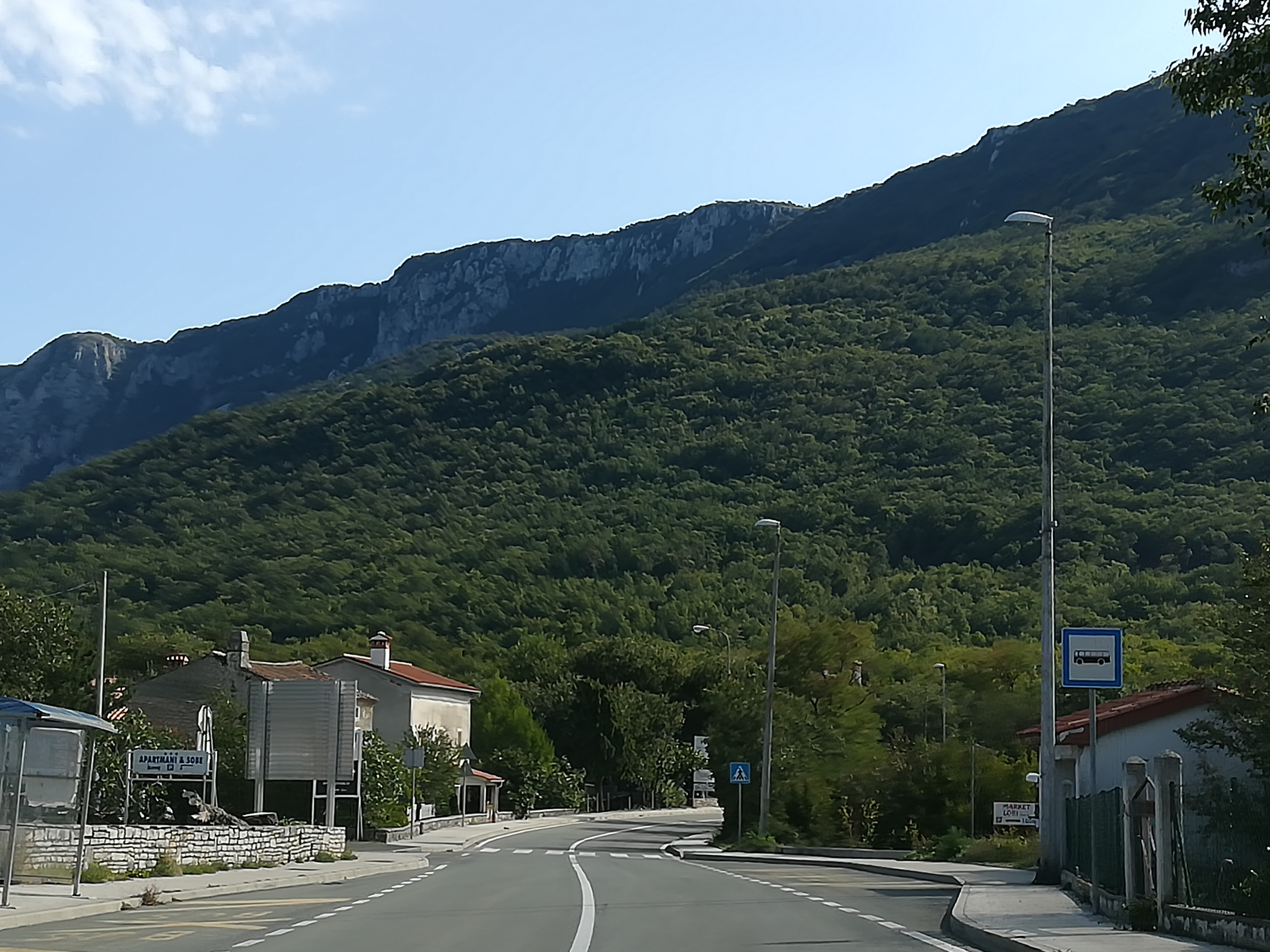 Vozilići, Kršan